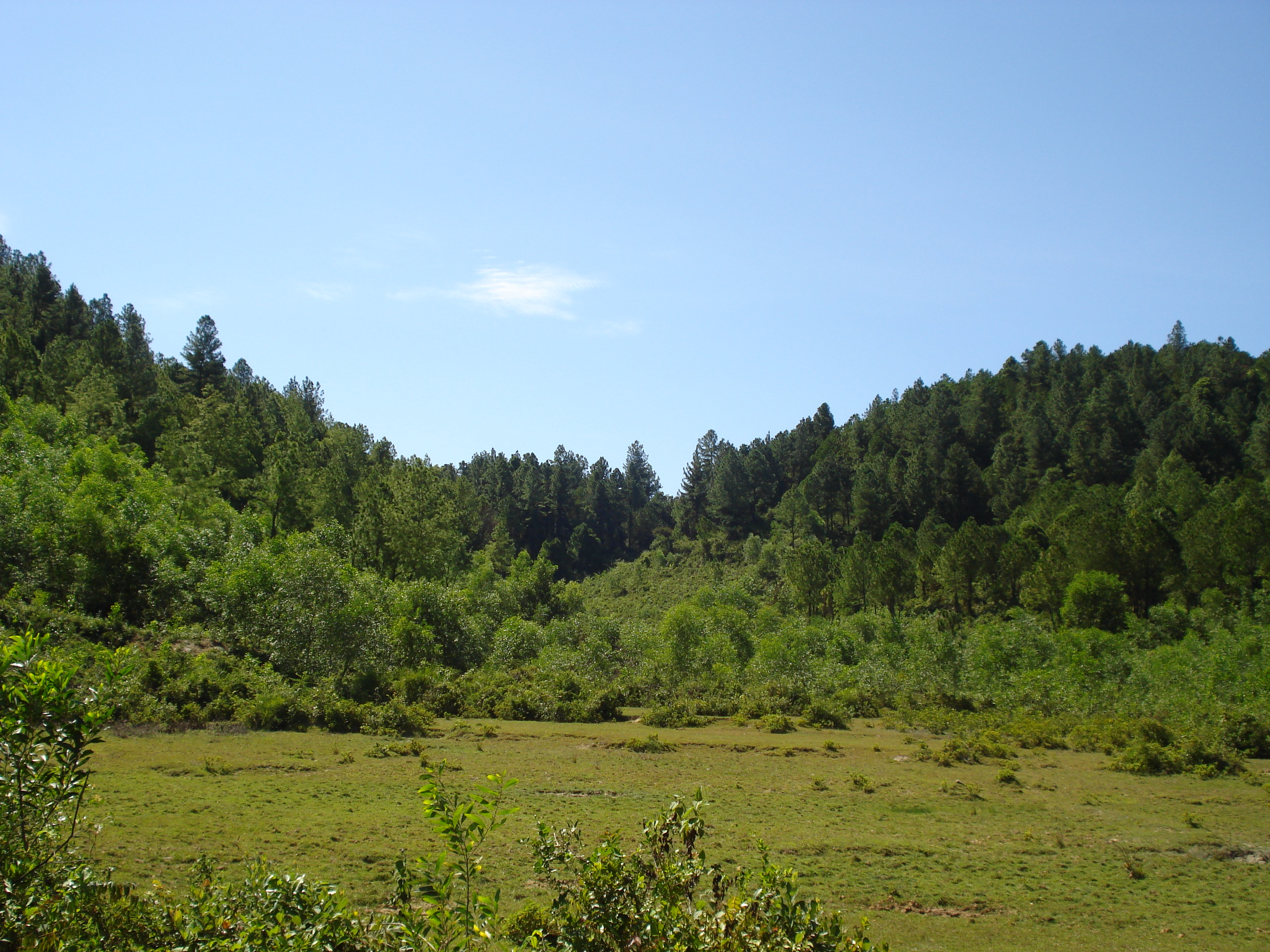 Phuninh_Reserve_Forest